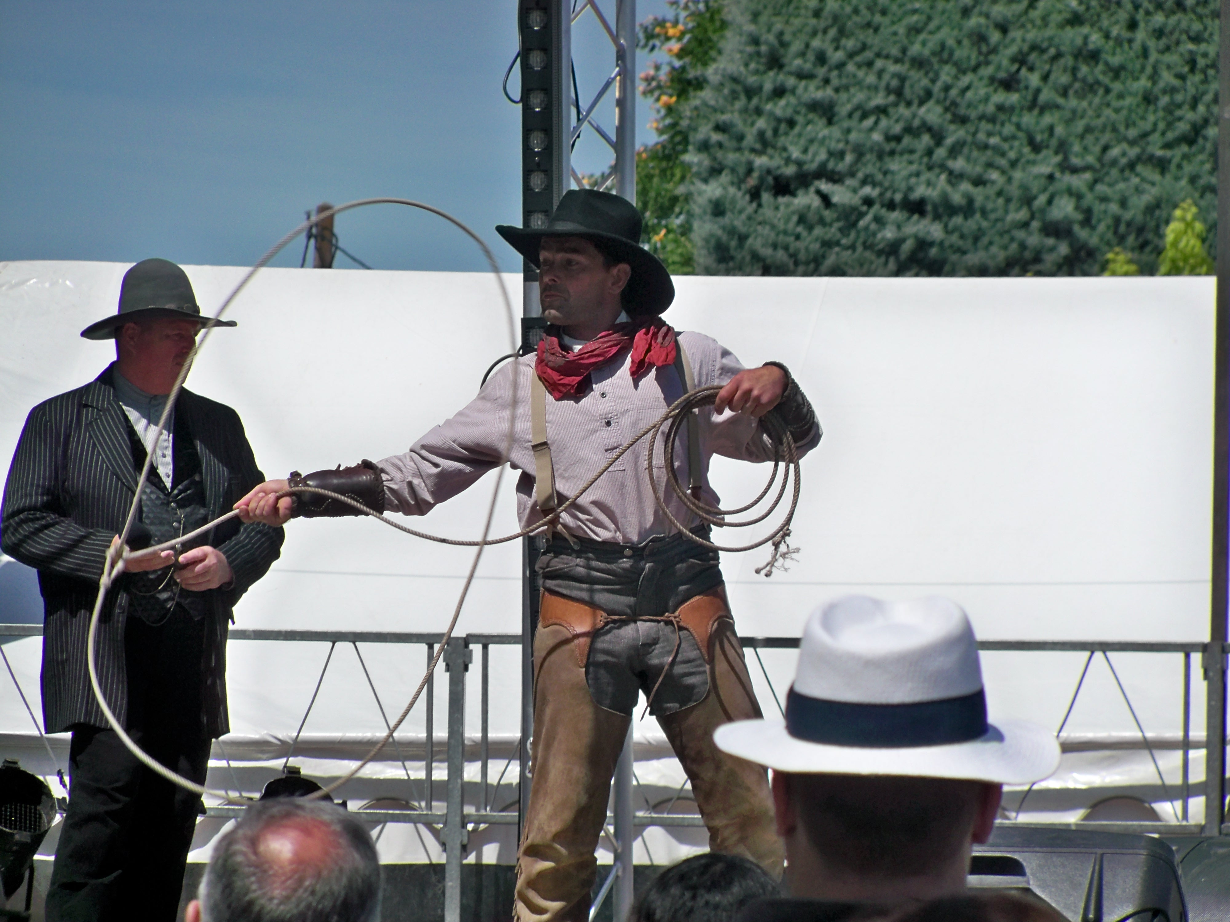 utilisation de lasso